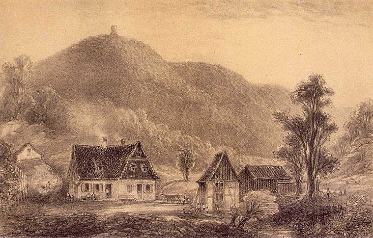 Le Ramsthal et le Château de Greifenstein. Bibliothèque nationale et universitaire de Strasbourg